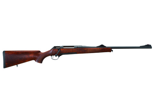 Bolt action Jaeger.10 from Suhl manufacturer Haenel